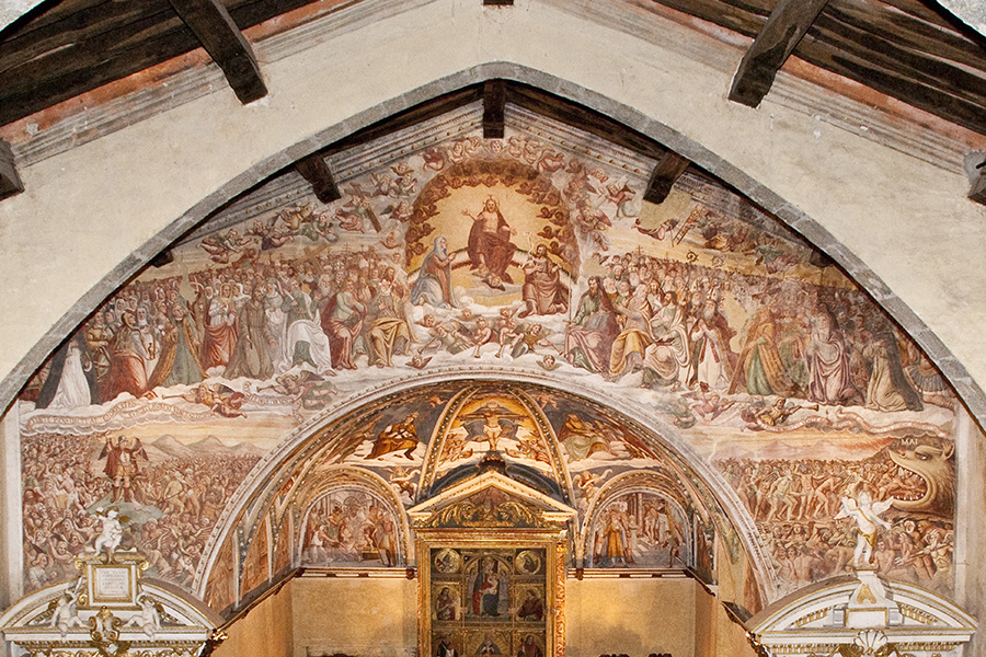 giudizio universale (Cristoforo baschenis), al santuario della Santissima Trinità di Casnigo.